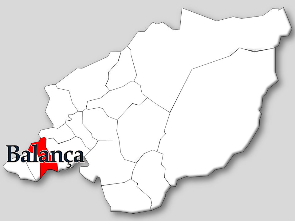 Censos 1864/2011